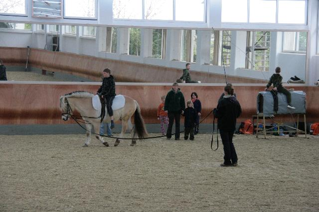 Das Reittherapiezentrum